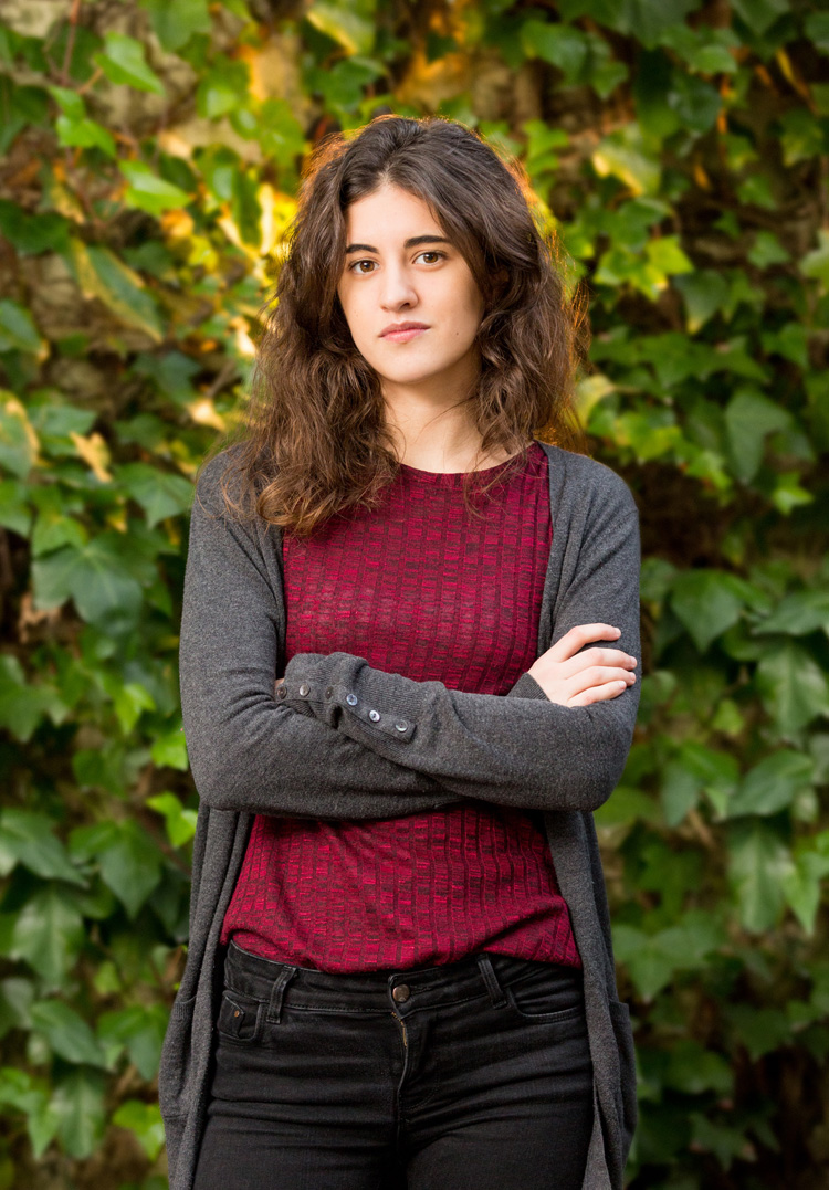 Izaro Andres musikariari ARGIA astekariaren 2542 zenbakiko elkarrizketarako Dani Blancok egindako argazkia